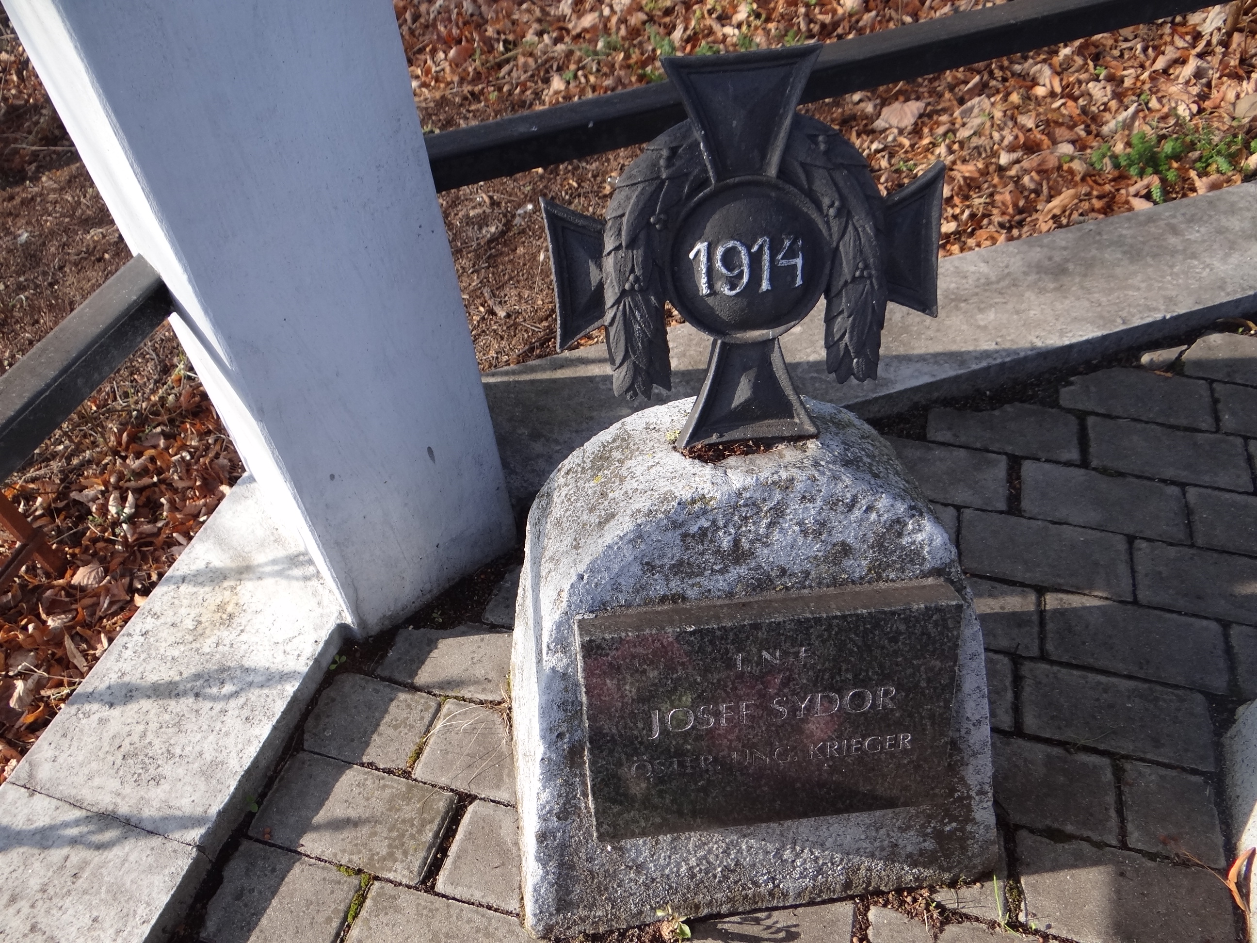 Cmentarz wojenny nr 354 - Sienna